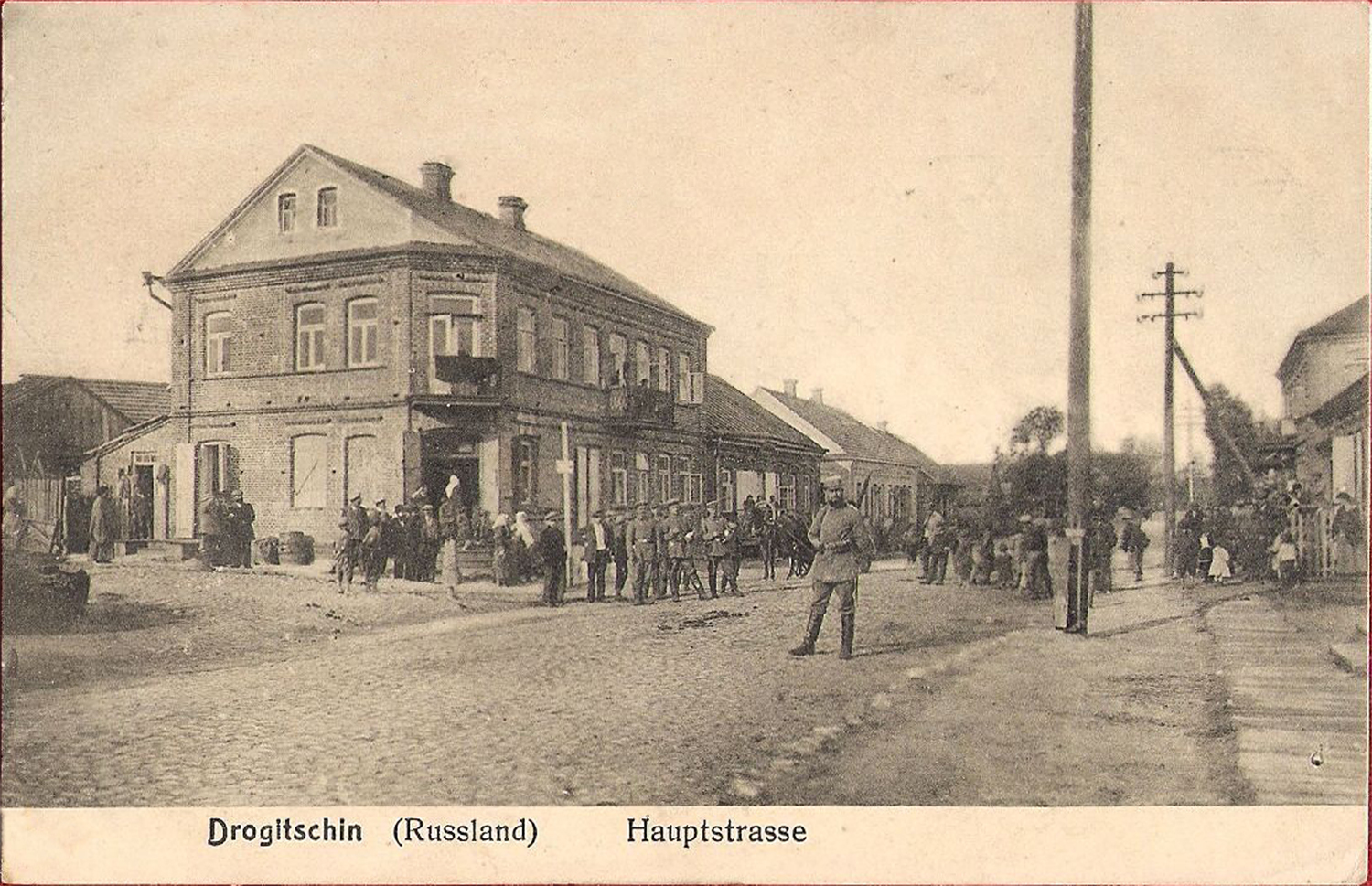 Беларуская (тарашкевіца): Дарагічын (Darahičyn), вуліца Пінская (vulica Pinskaja)